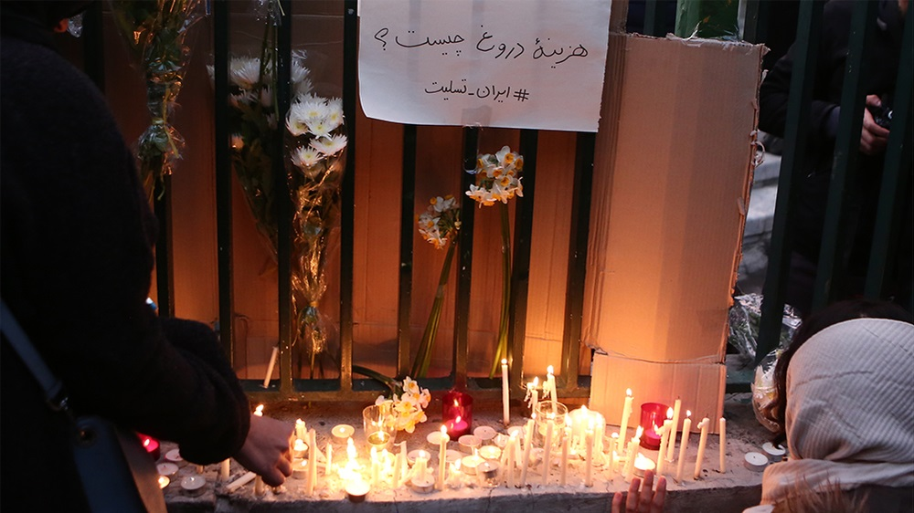 تجمع و تظاهرات مردم در بیرون از دانشگاه امیرکبیر تهران در اعتراض به سرنگونی هواپیمای مسافربری بوئینگ ۷۳۷ توسط موشک‌های سپاه پاسداران انقلاب اسلامی